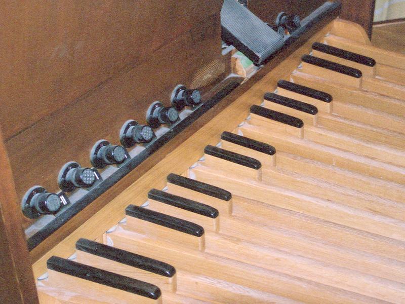 organ pedals